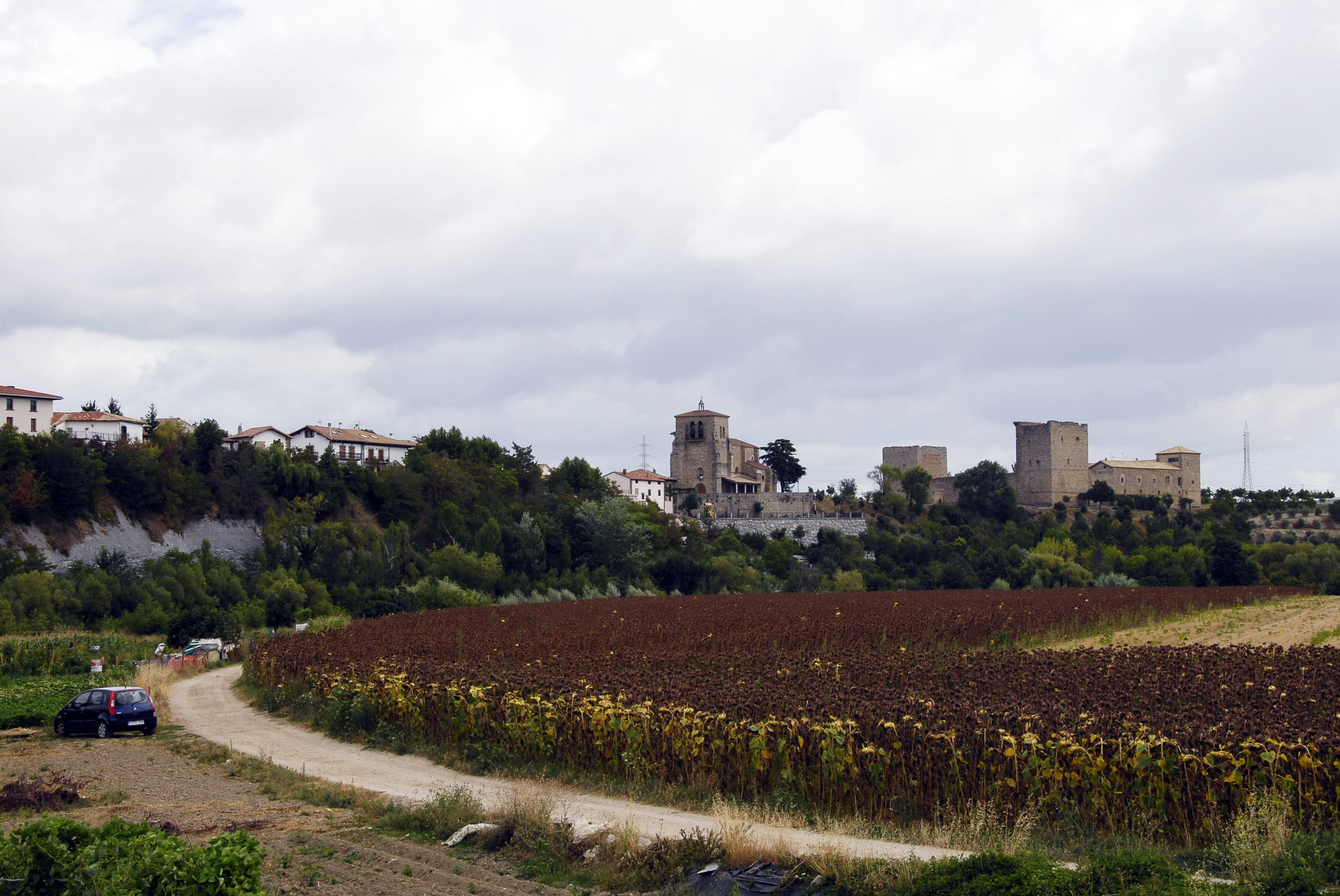 Castillo de Arazuri (Navarra)